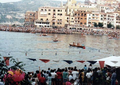 Palio marinaro edizione del 1987